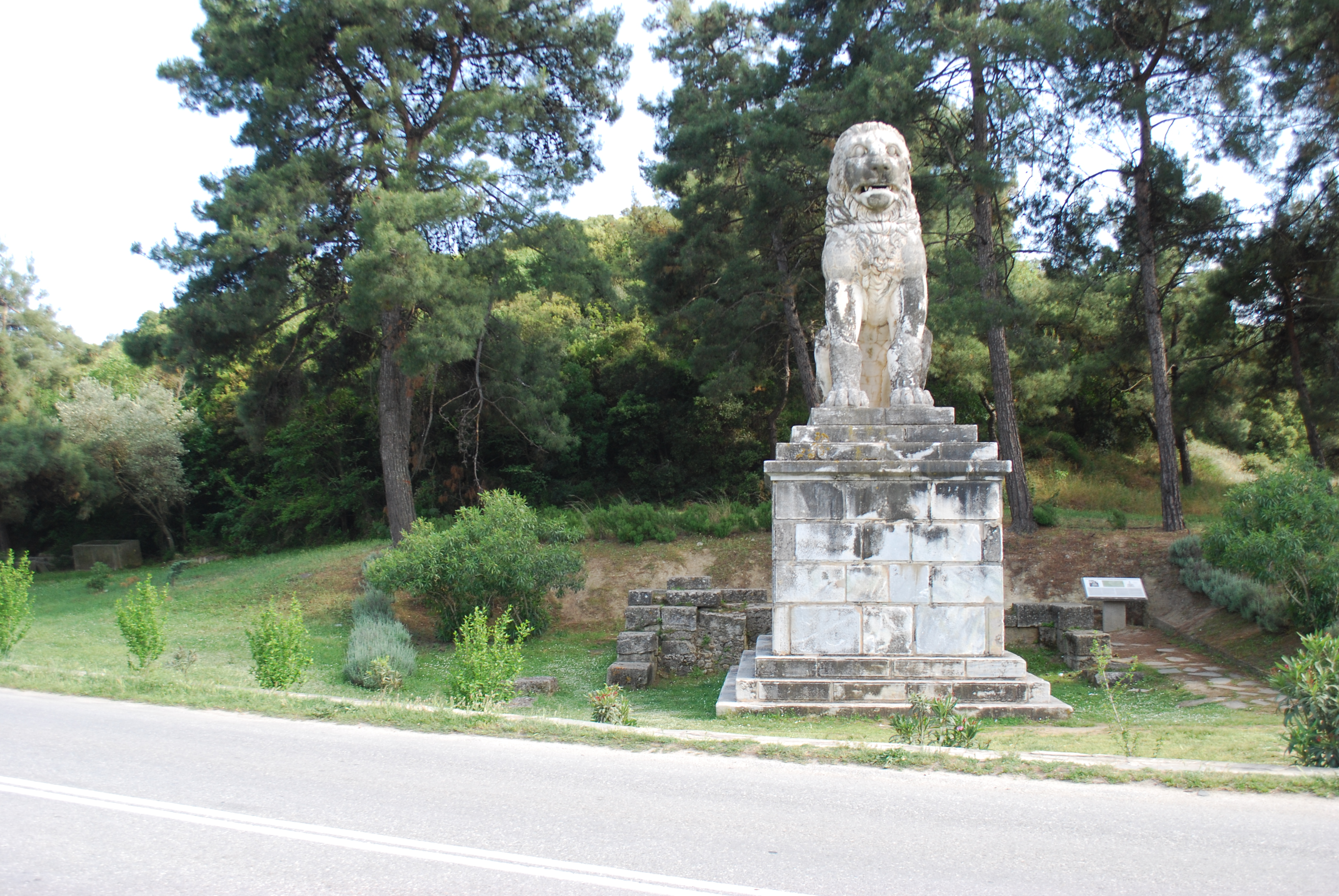 Vue du lion d'Amphipolis.